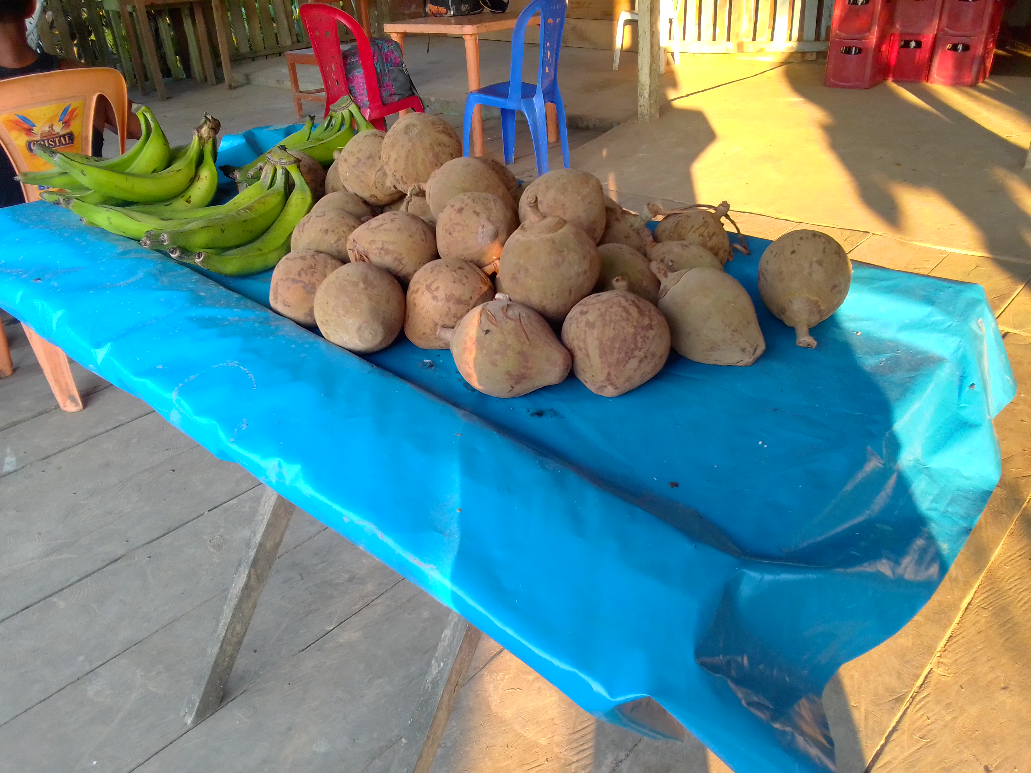 Zapotes y plátanos en el sur de Iquitos